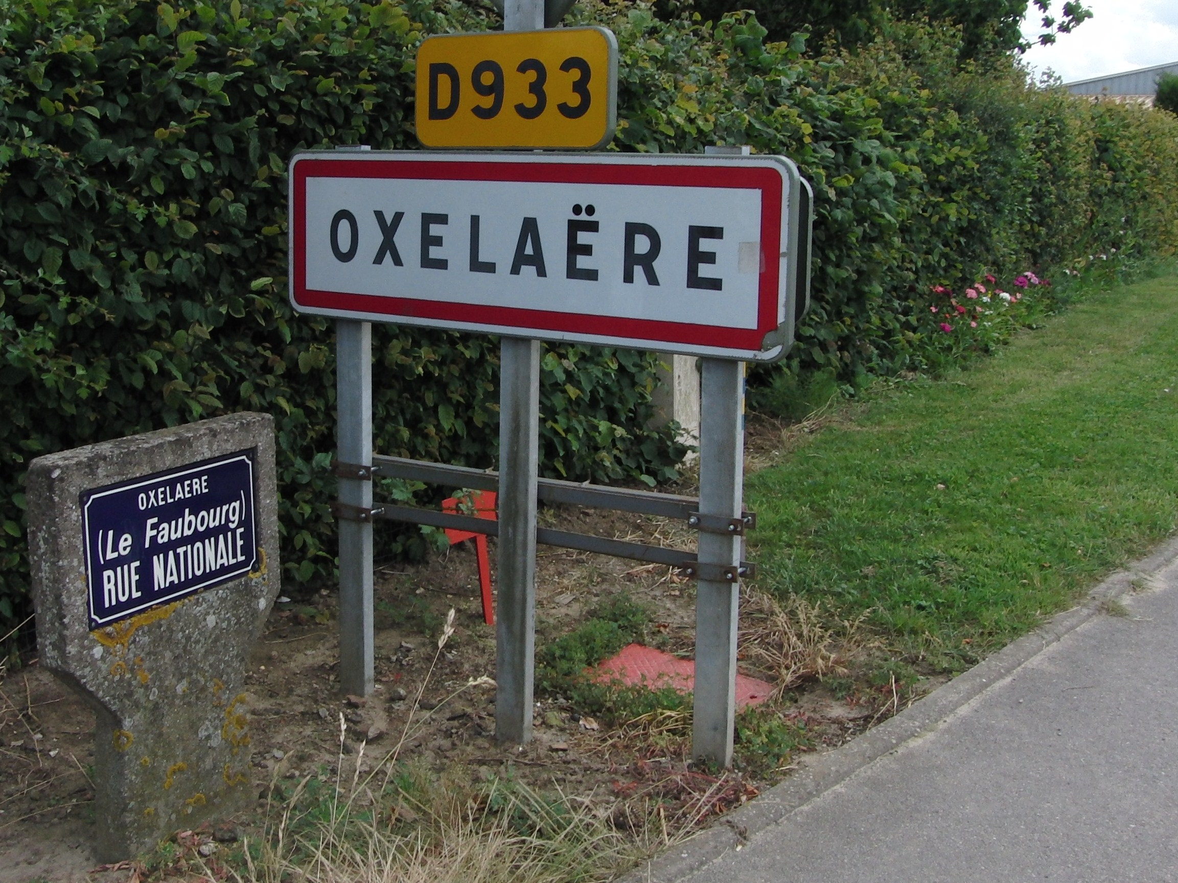 Oxelaëre (Nord, Fr).- city limit sur la D933